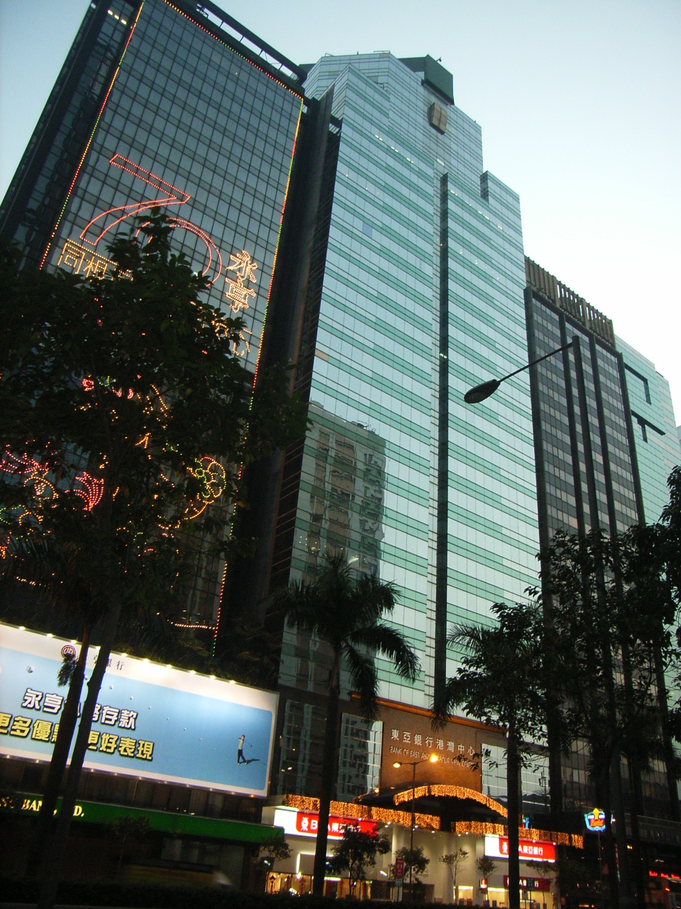 東亞銀行港灣中心 (Bank of East Asia Harbour View Centre)，前稱第一太平銀行中心，是zh:香港zh:灣仔北的一座zh:商業zh:大廈。大廈樓高29樓，基座4層是zh:停車場，5樓以上為zh:辦公室，每層約7.8千平方呎。大廈於zh:1991年落成，發展商是zh:華人置業有限公司。 東亞銀行港灣中心位於zh:灣仔zh:告士打道51至57號。 Photo by me.